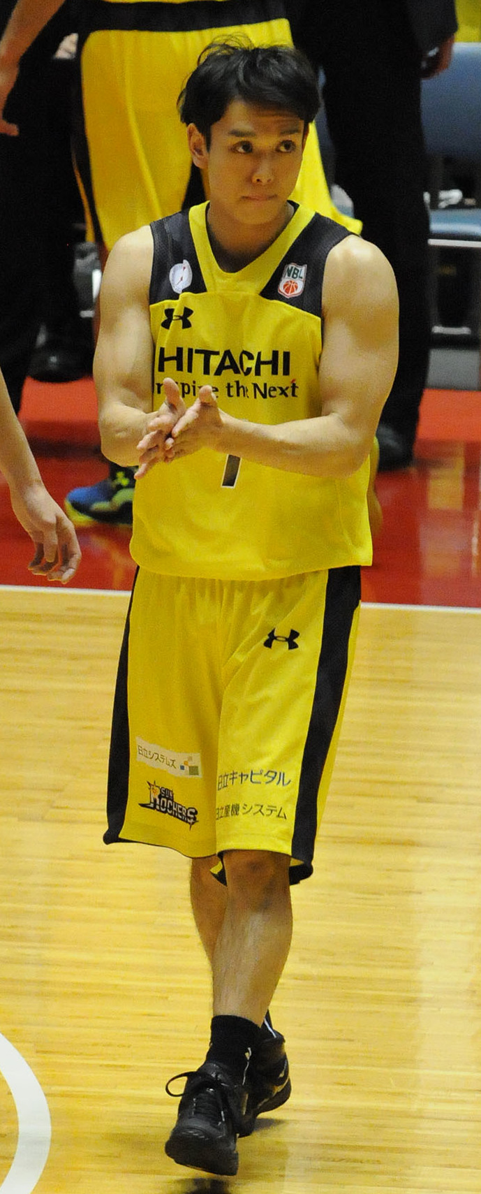 日立サンロッカーズ東京、伊藤駿選手。代々木第一体育館で。